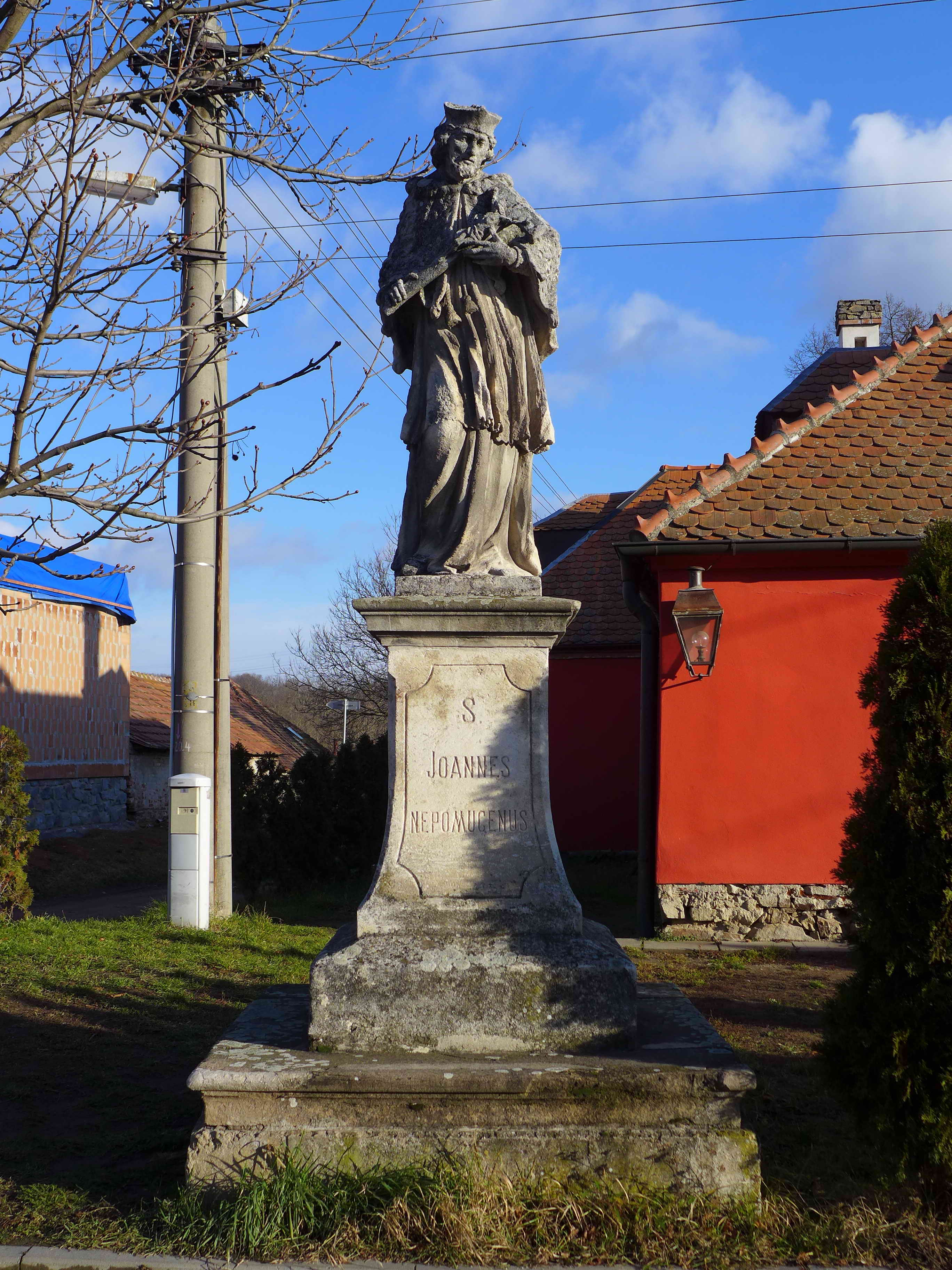 Socha svatého Jana Nepomuckého, náves, Vémyslice.